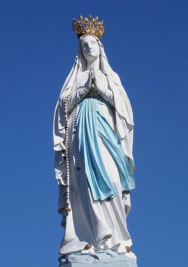 Statue de Notre-Dame de Lourdes apparue dix-huit fois à Bernadette Soubirous à Lourdes